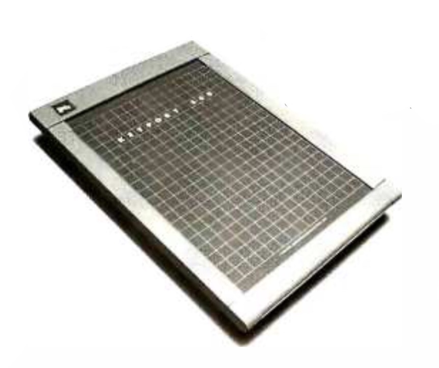 Tablette pour Apple II et IBM PC basée sur une technologie résistive pour déterminer les coordonnées d'une touche